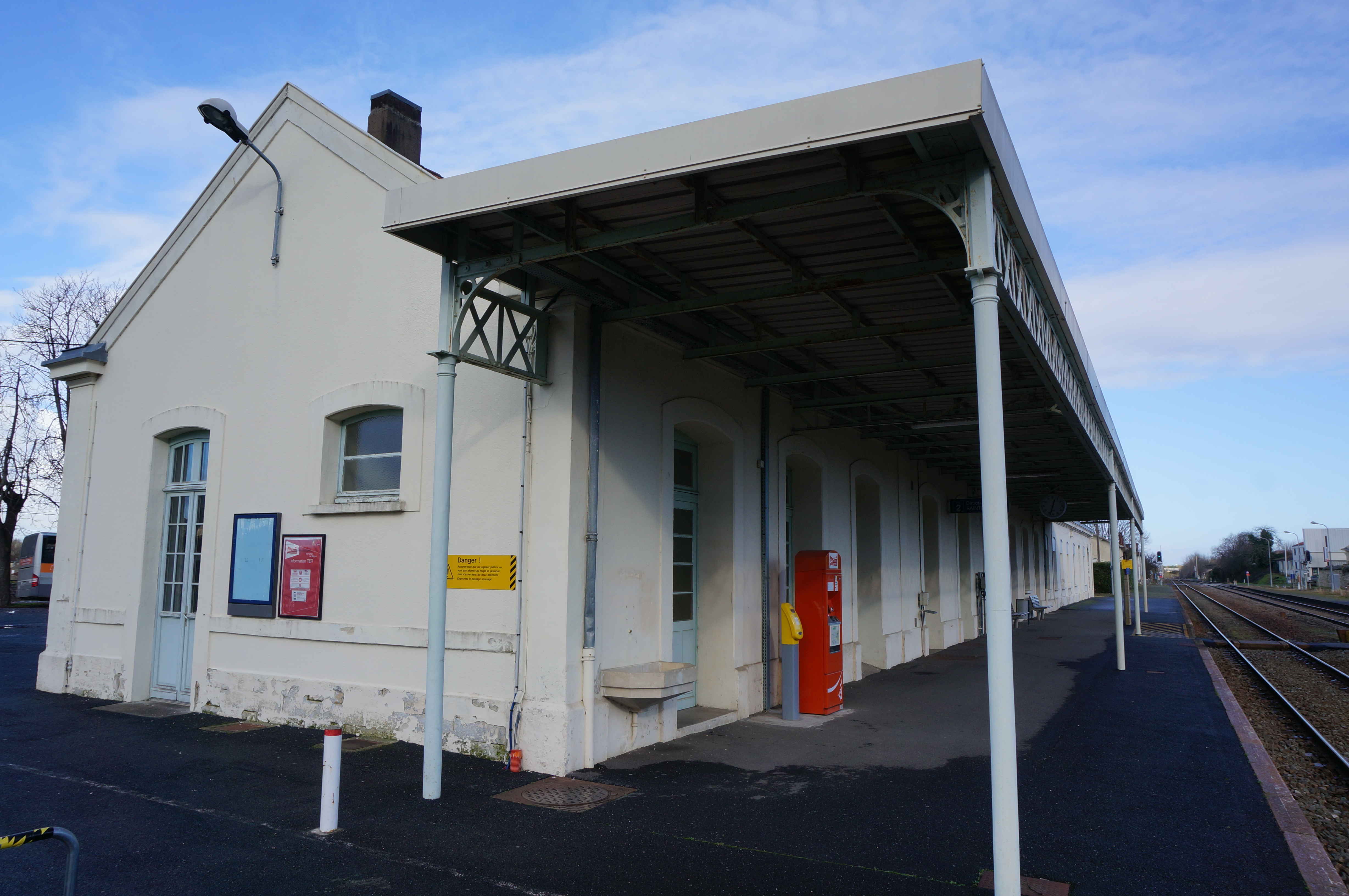 Bâtiment voyageurs, quais et voies, de la gare de Pons, Charente-Maritime, France, en regardant vers Saintes.